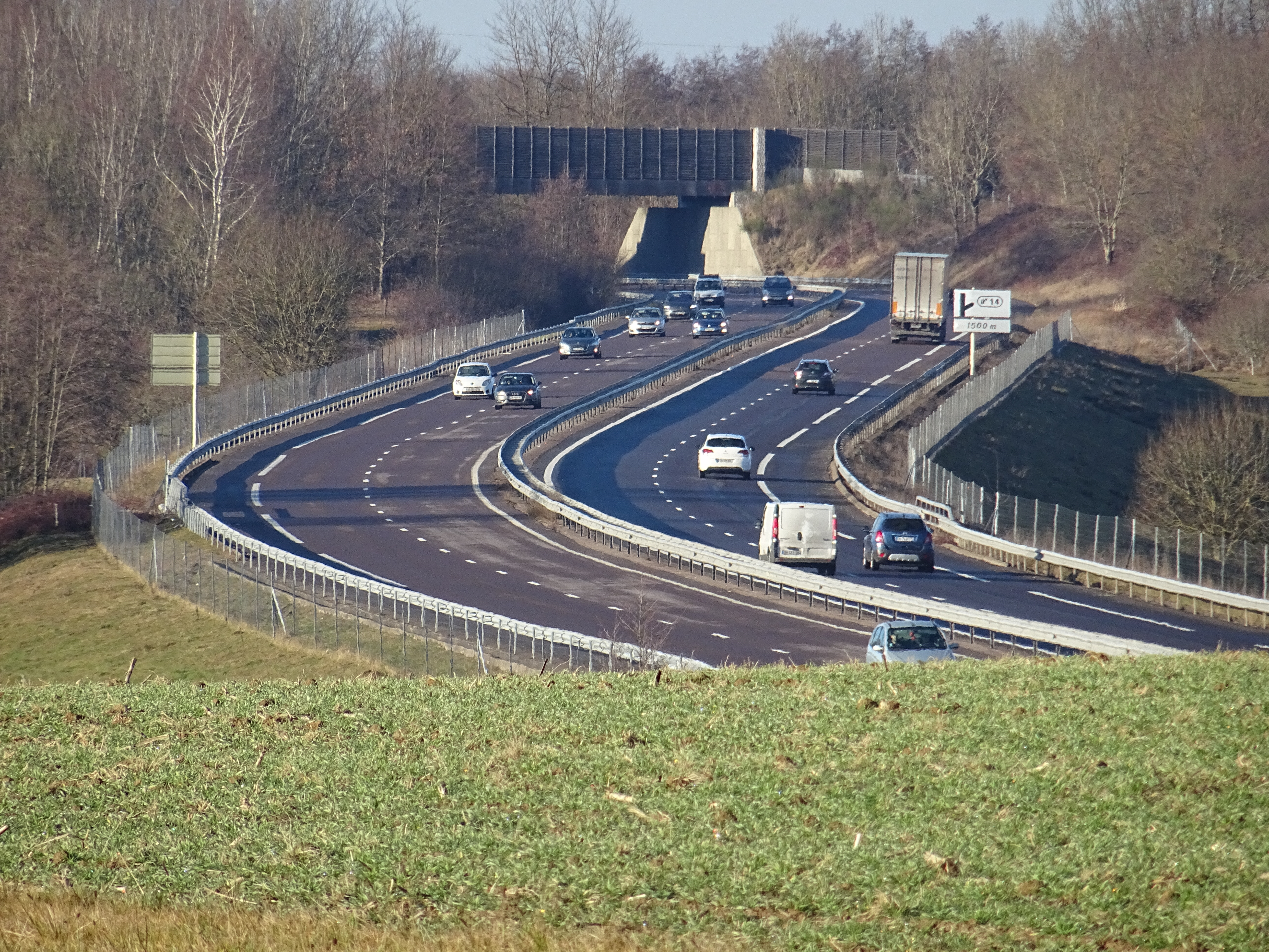 La 2x2 voies RN 19 passant entre les communes de Frotey-lès-Lure, Lyoffans et Palante.